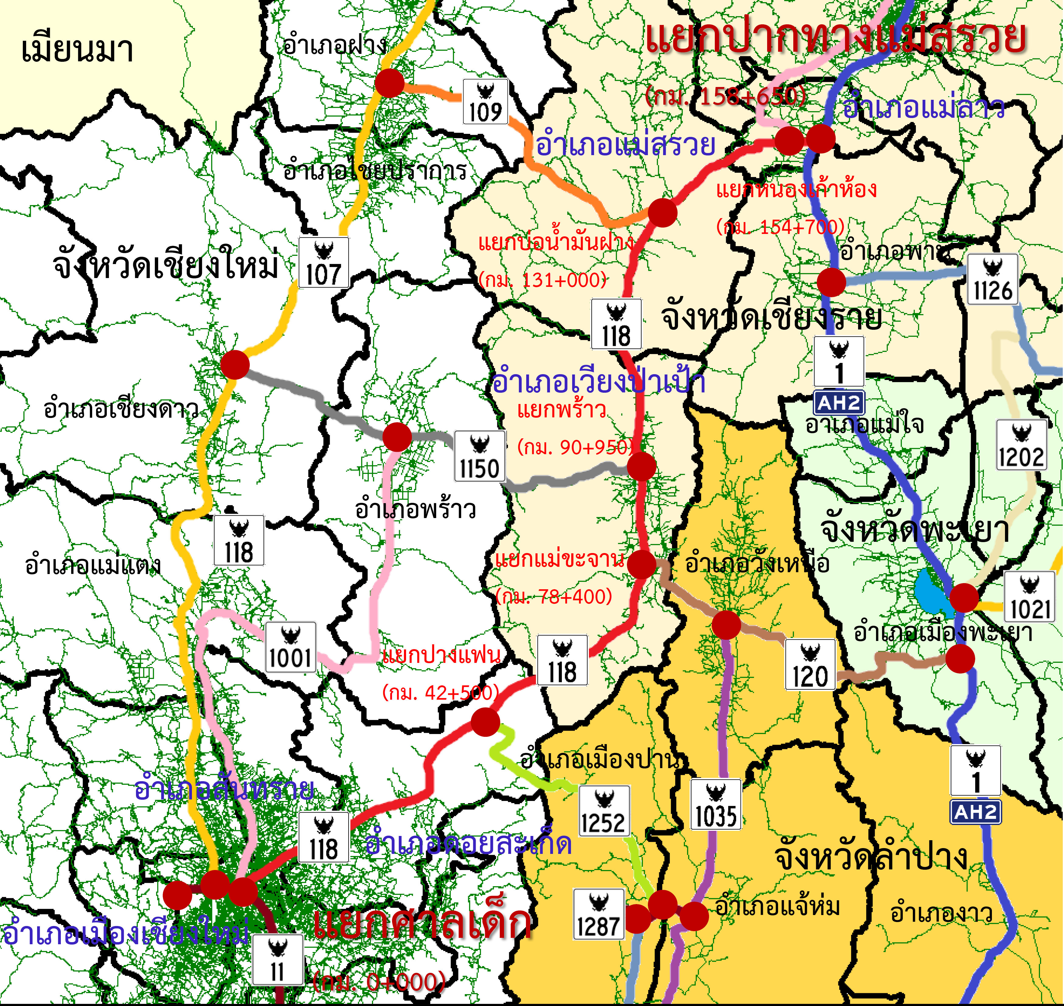 TH HW 118 map 2